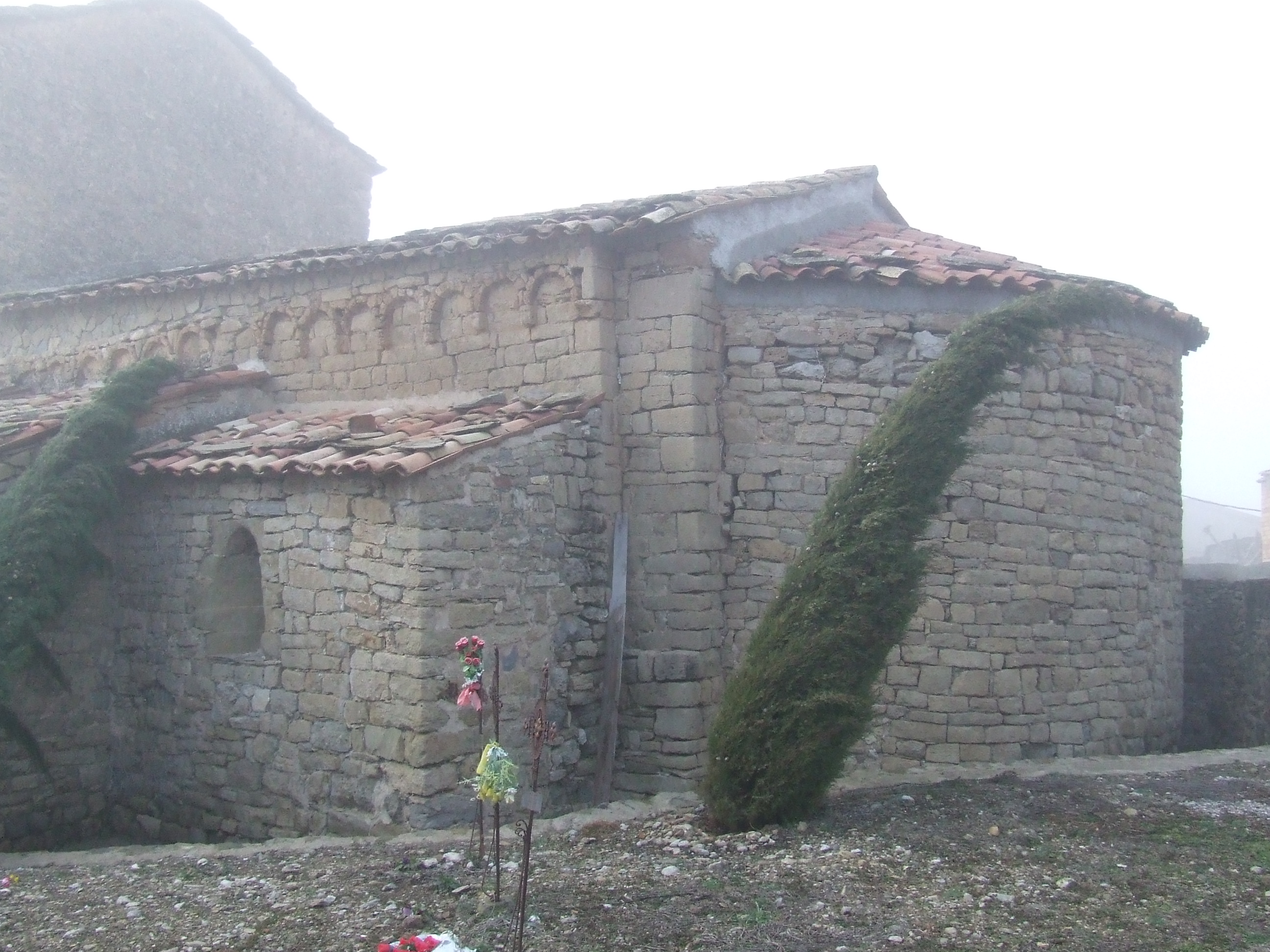 Sant Pere d'Aransís (Gavet de la Conca, Pallars Jussà)